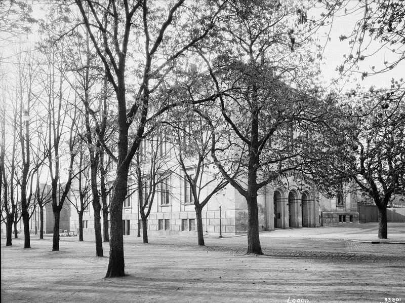 Den gamle logen